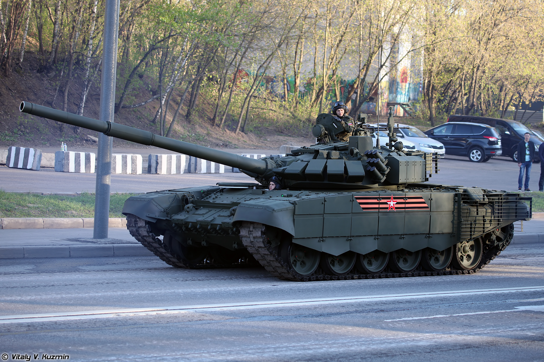 Модернизированный Т-72Б3 с дополнительной защитой, также обозначается как Т-72Б3 образца 2016 г. (Modernized T-72B3 with additional armor, also referred to as T-72B3 mod. 2016)